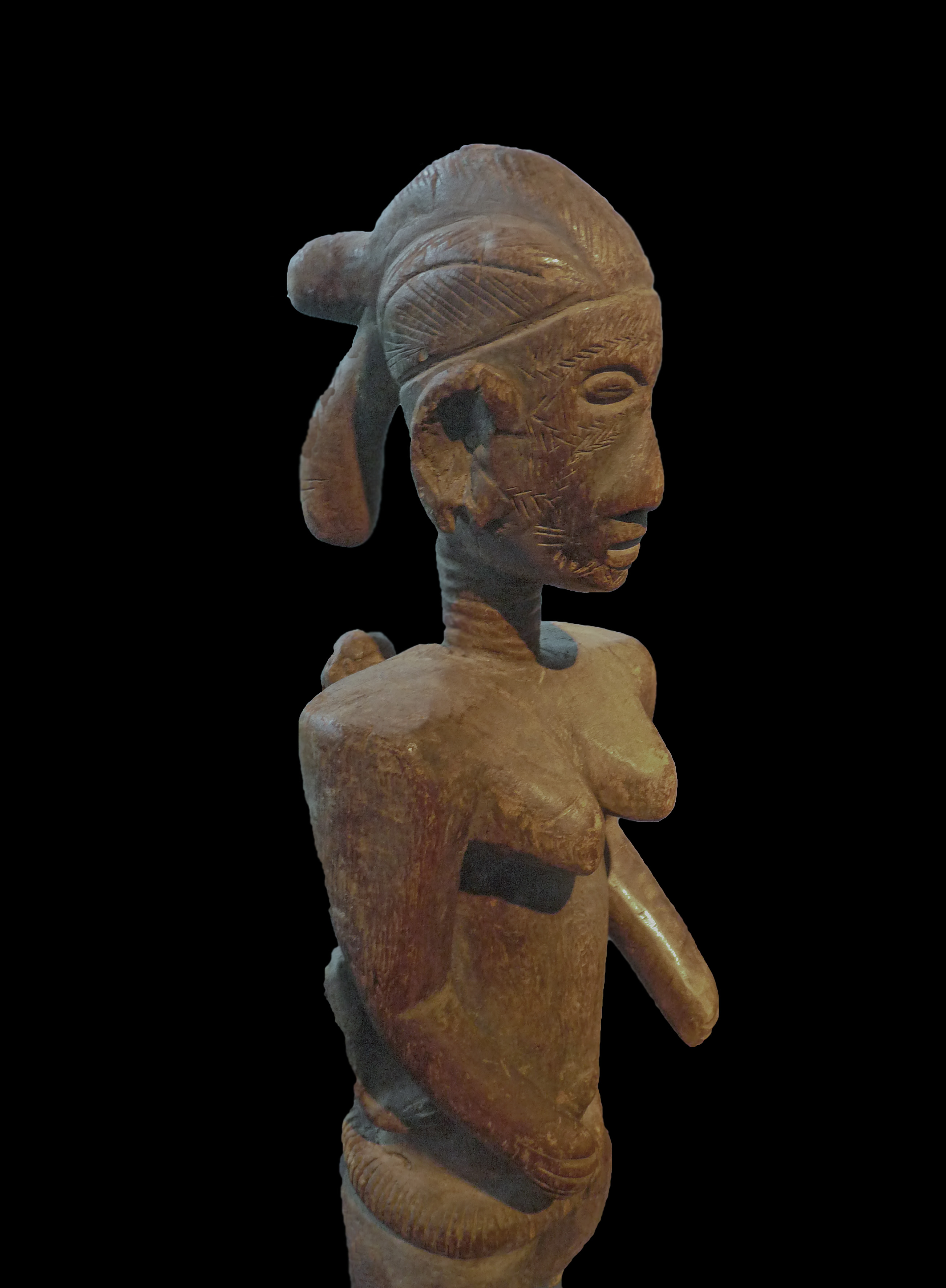 Goemai : sculpture féminine. Première moitié du XXe s. Bois. Metropolitan Museum of Art. Exposition Nigeria. Arts de la vallée de la Bénoué au musée du quai Branly (Paris).